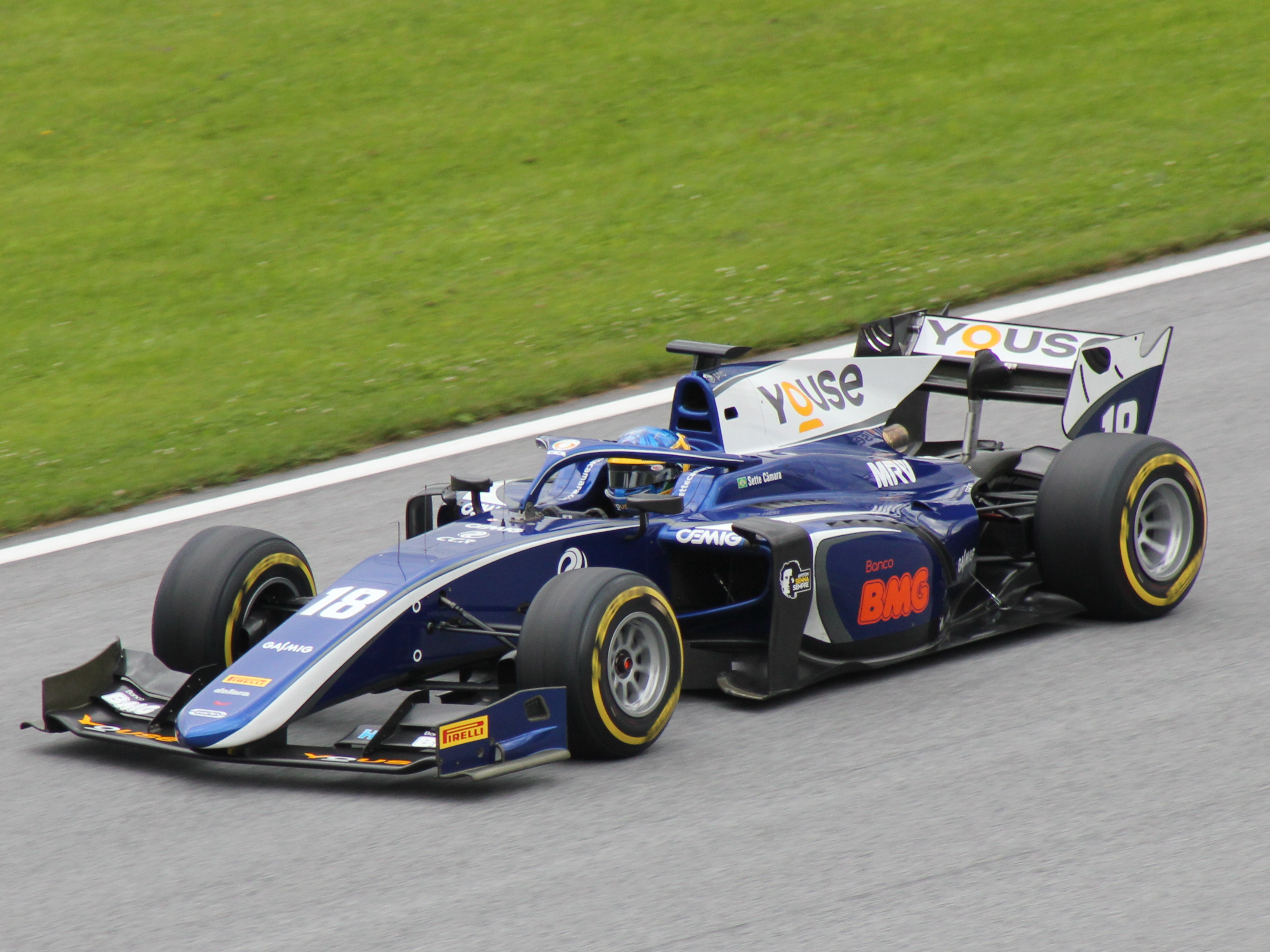 18 Sergio Sette Camara beim Rennwochenende in Österreich 2018 (3)